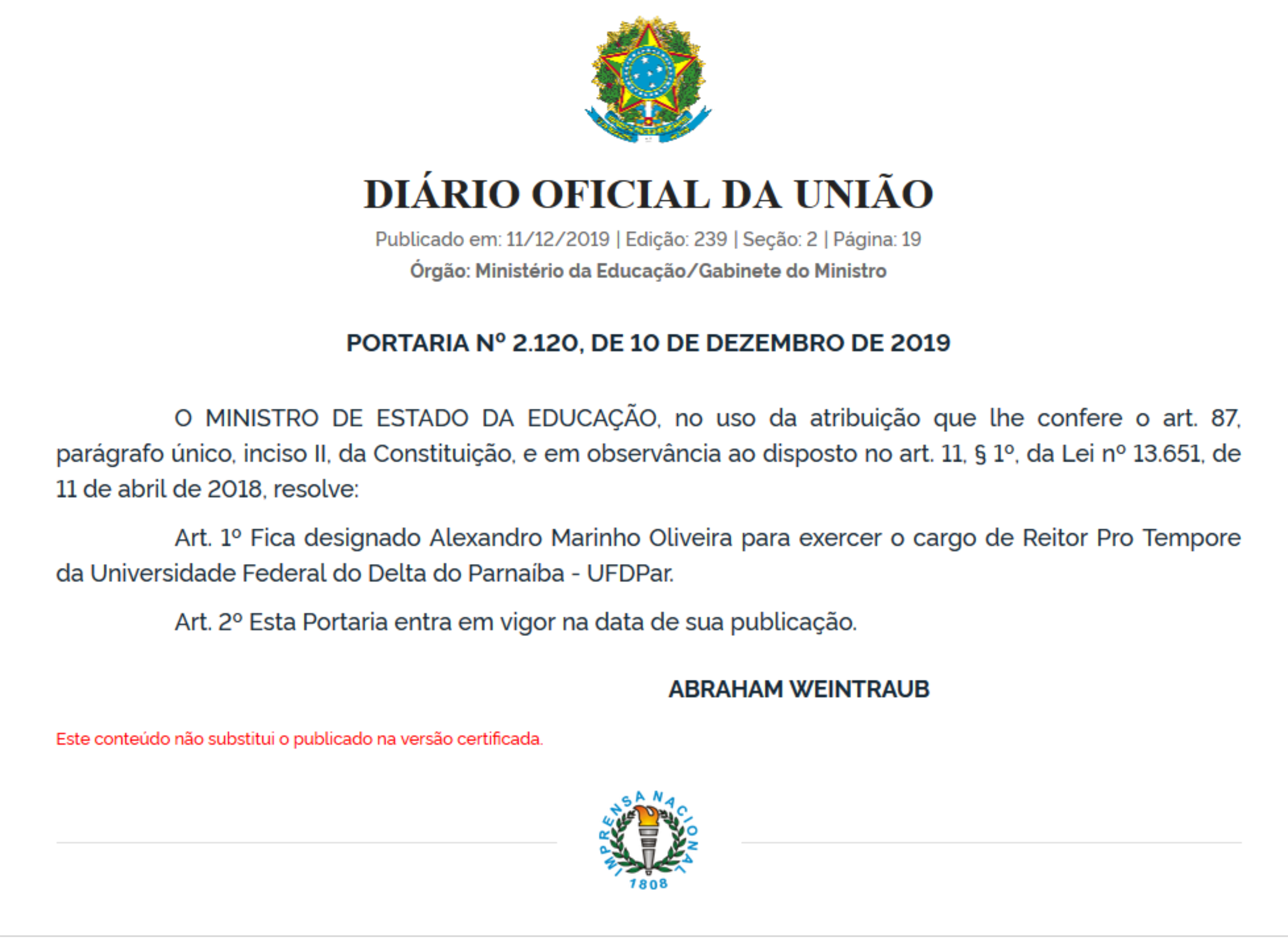 Portaria Nº 2.120, de 10 de dezembro de 2019, o documento pelo qual o Governo do Brasil por meio do Ministério da Educação nomeia o reitor pro tempore da Universidade Federal do Delta do Parnaíba